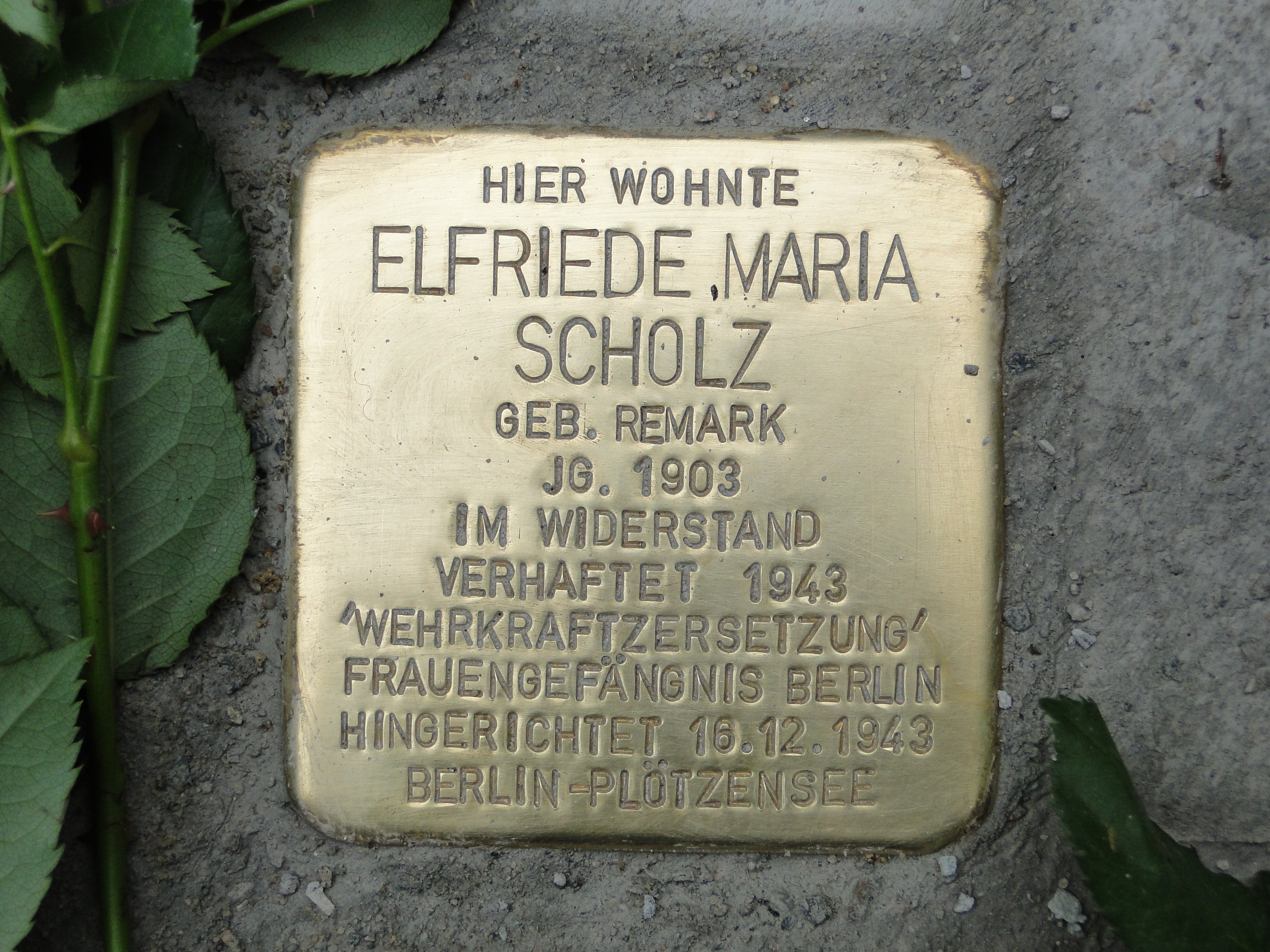 Stolperstein für Elfriede Maria Scholz, die Schwester von Erich Maria Remarque, in Dresden